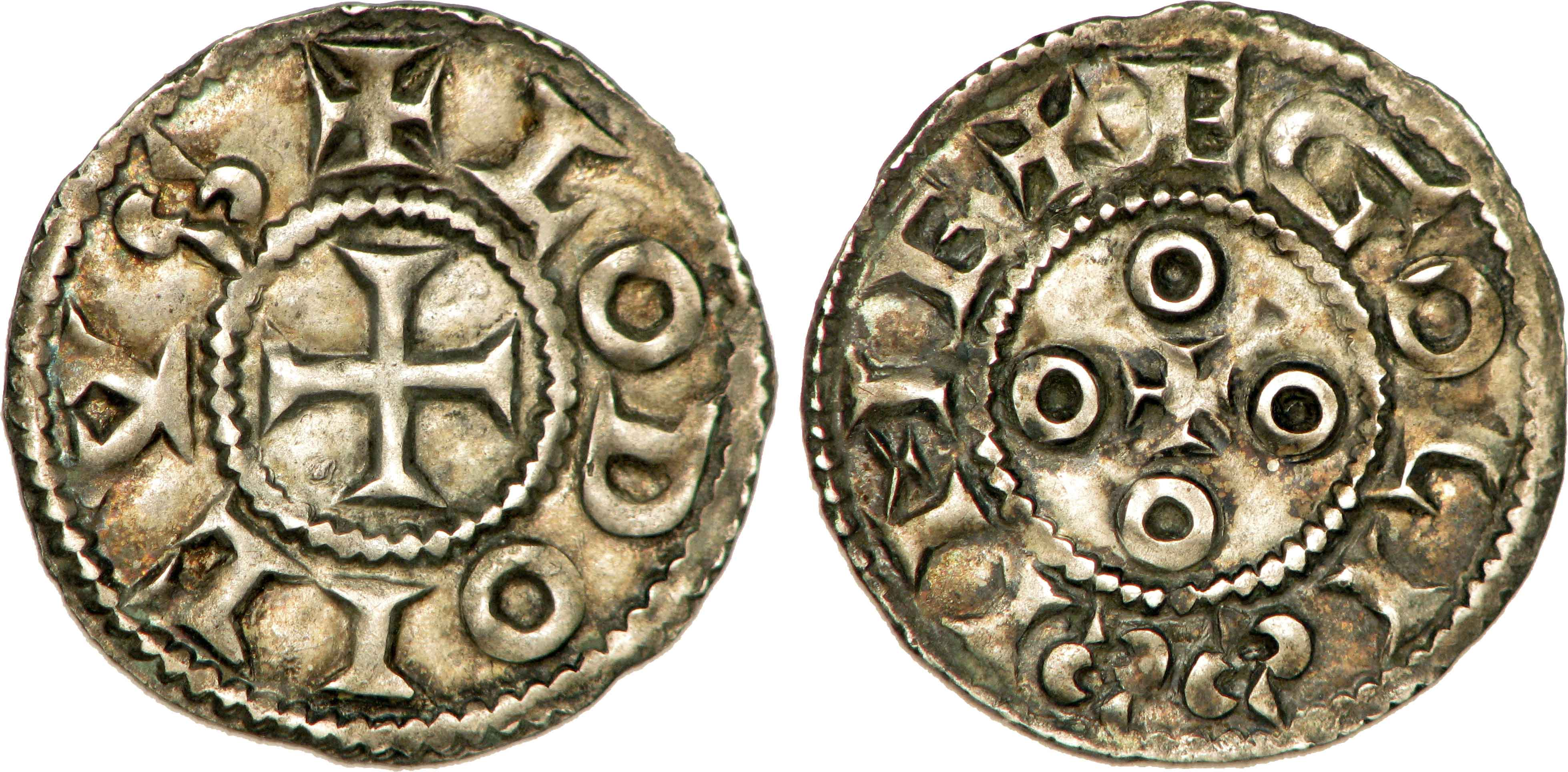 Nom de l'atelier/ville : Angoulême Métal : argent Diamètre : 21,5mm Axe des coins : 6h. Poids : 1,53g. Titulature avers : + LODOICVS. Description avers : Croix. Traduction avers : (Louis). Titulature revers : + EGOLISSIME. Description revers : Quatre annelets autour d'une croisette. Traduction revers : (Angoulême).